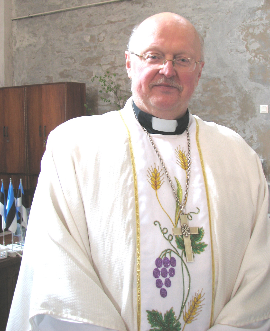 Tiit Salumäe